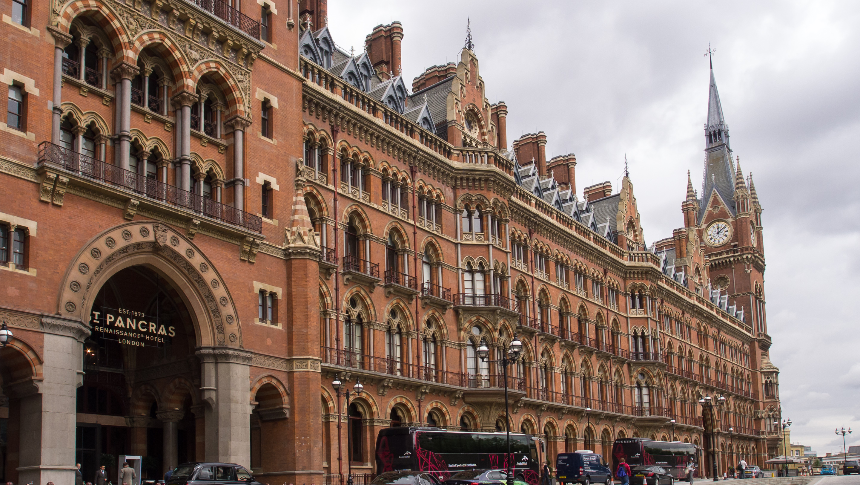 Вокзал Сент-Панкрас в Лондоне